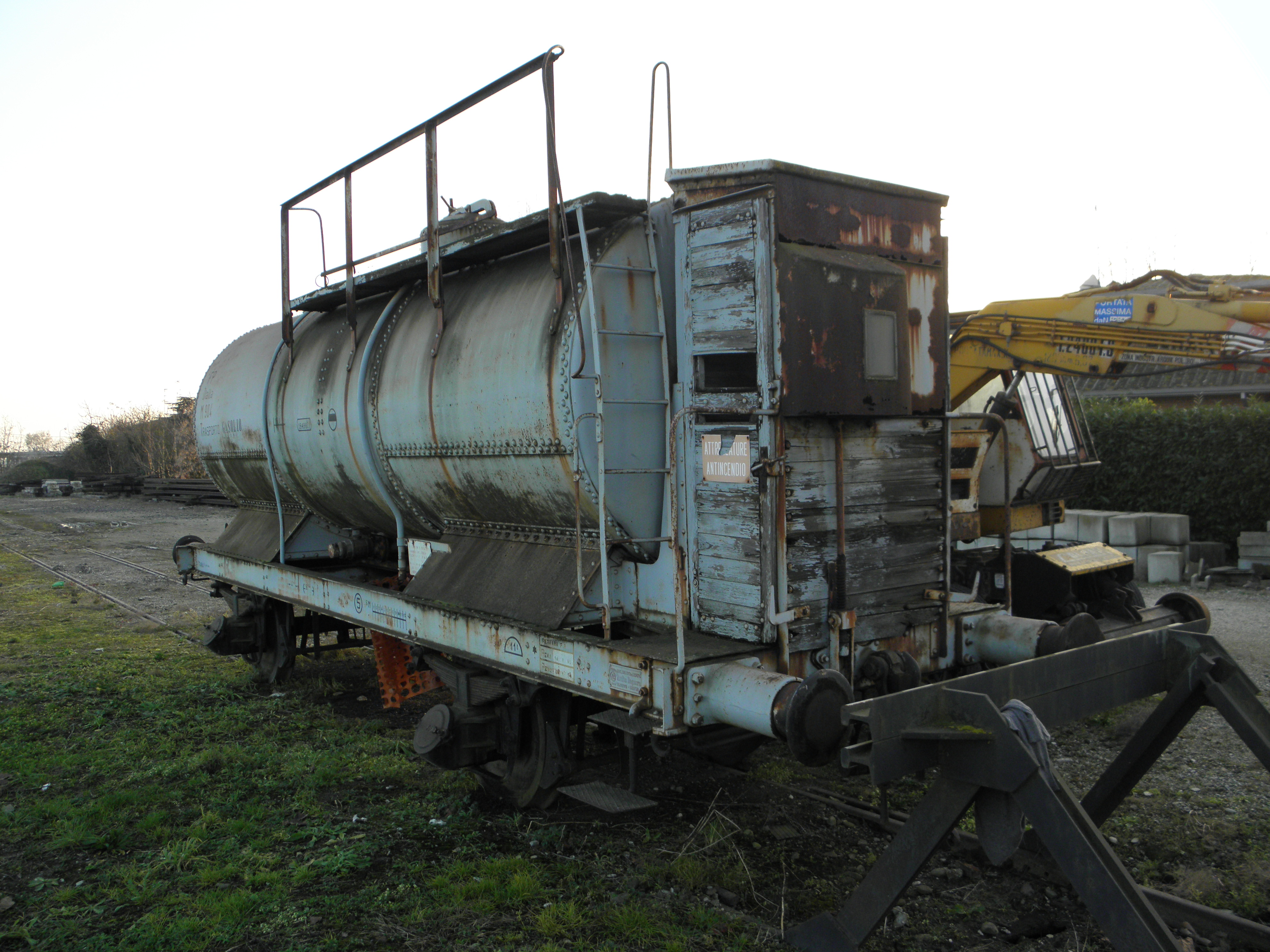 Stazione di Rovereto-San Vito-Medelana: un carro cisterna realizzato dall'azienda Attilio Bagnara di Genova.